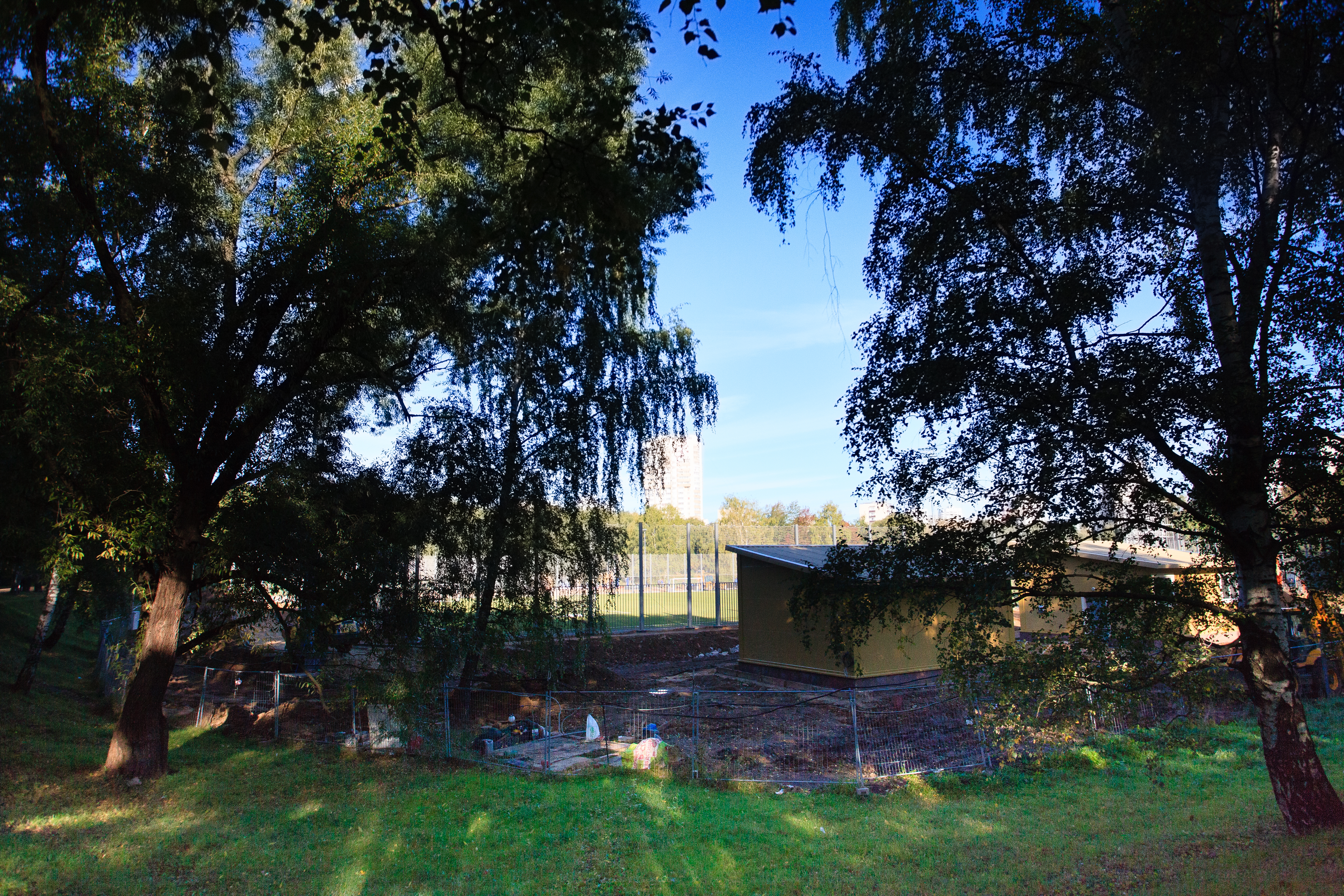 Строительство футбольного поля с инфраструктурой для спортивной школы № 76 «Москомспорта». Парк Дружбы был основан в честь VI Всемирного фестиваля молодёжи и студентов 1957 года. Архитекторы - Галина Ежова, Анатолий Савин, Валентин Иванов, руководитель проекта - Виталий Долганов.